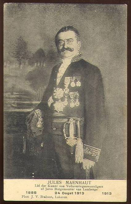 Jules Maenhaut van Lemberge - Lemberge - Merelbeke - Oost-Vlaanderen - Vlaanderen - België